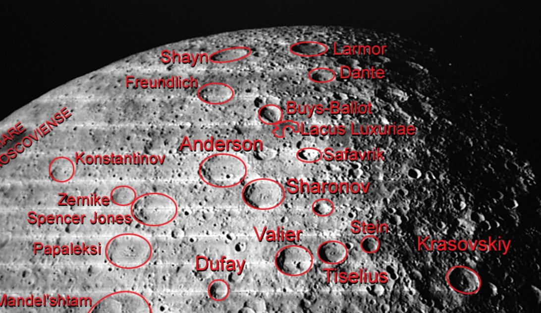 Entorno del cráter Anderson. Imagen Digital Lunar Orbiter Photographic Atlas of the Moon. Esta imagen contiene un error, y el cráter marcado como Safavrik es en realidad Virtanen. Šafařík es el círculo sin nombre situado por debajo del rótulo de Sharonov.